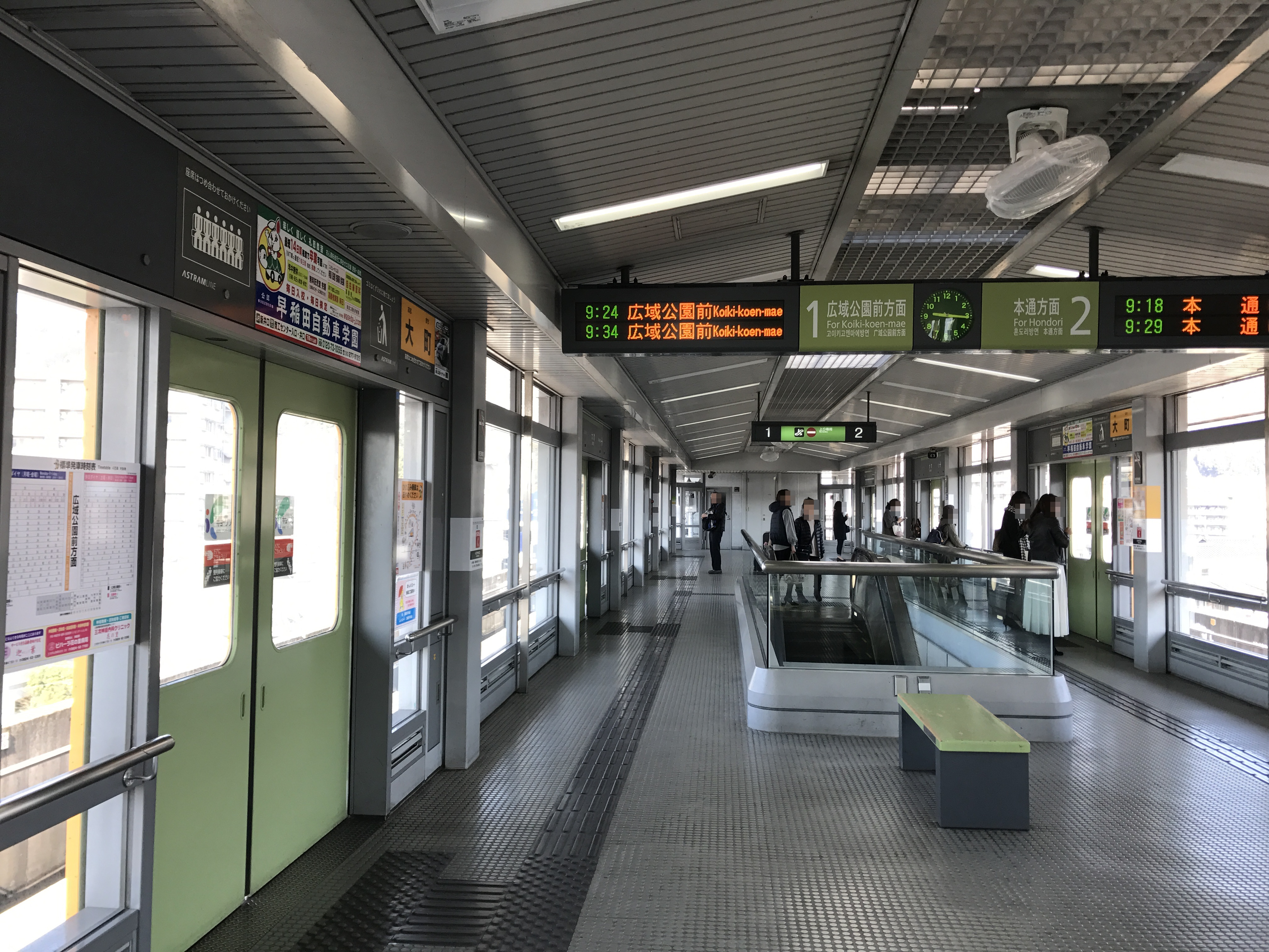 大町駅(アストラムライン)のホーム(毘沙門台方面)